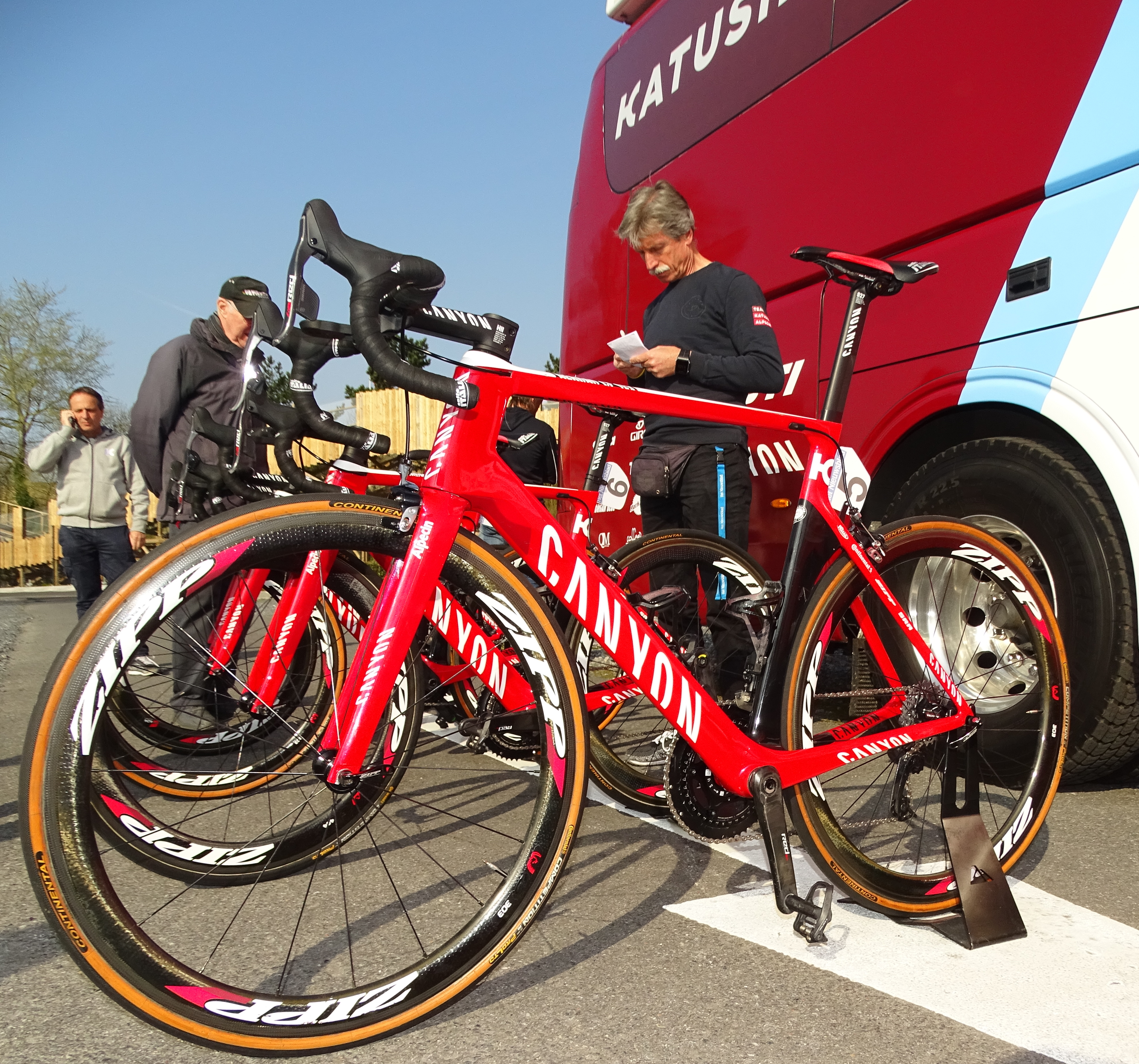 Reportage réalisé le mardi 28 mars à l'occasion de du départ de la première étape des Trois jours de La Panne 2017 à Adinkerque (La Panne), Belgique.